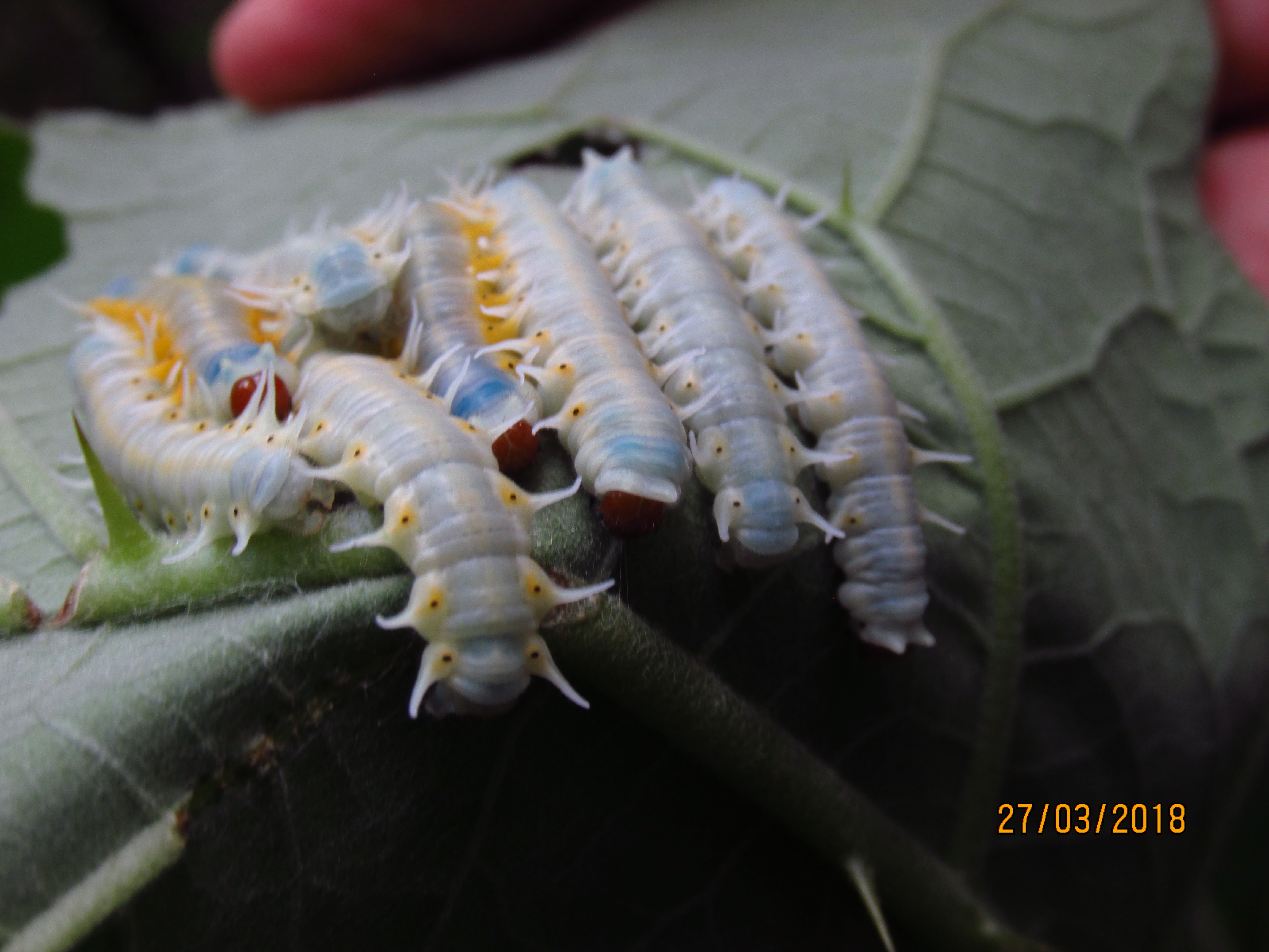 Foto de larvas de borboletas do gênero Mechanitis sobre solanácea, registrada no dia 27 de Março de 2018, em monitoramento feito na Cidade Universitária - USP - SP. - foto por Juliana Lira. Mechanitis butterfly larvae picture, above a solanacae plant, taked on March, 27th, 2018, in larvae monitoring at Cidade Universitária - USP - SP. - Picture taked by Juliana Lira